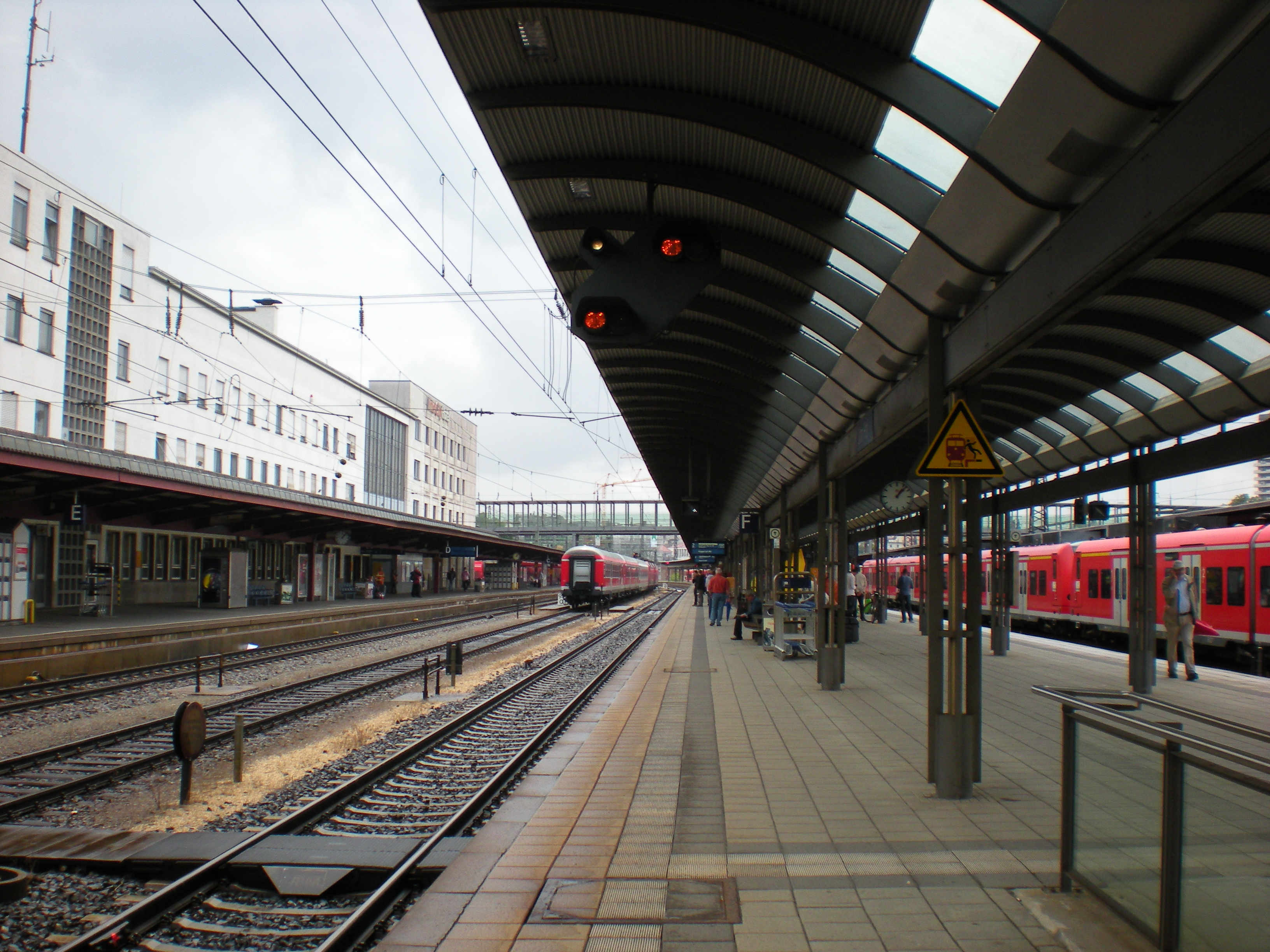 Bahnsteige des Ulmer Hauptbahnhofs